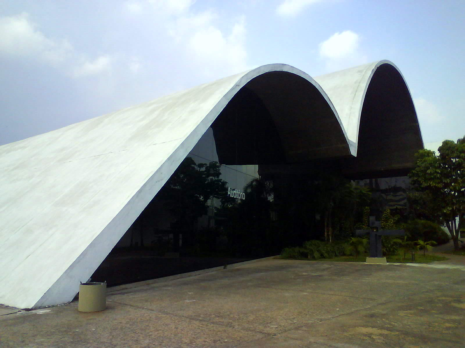 Auditório Simón Bolívar, Memorial da América Latina, São Paulo, Brasil.